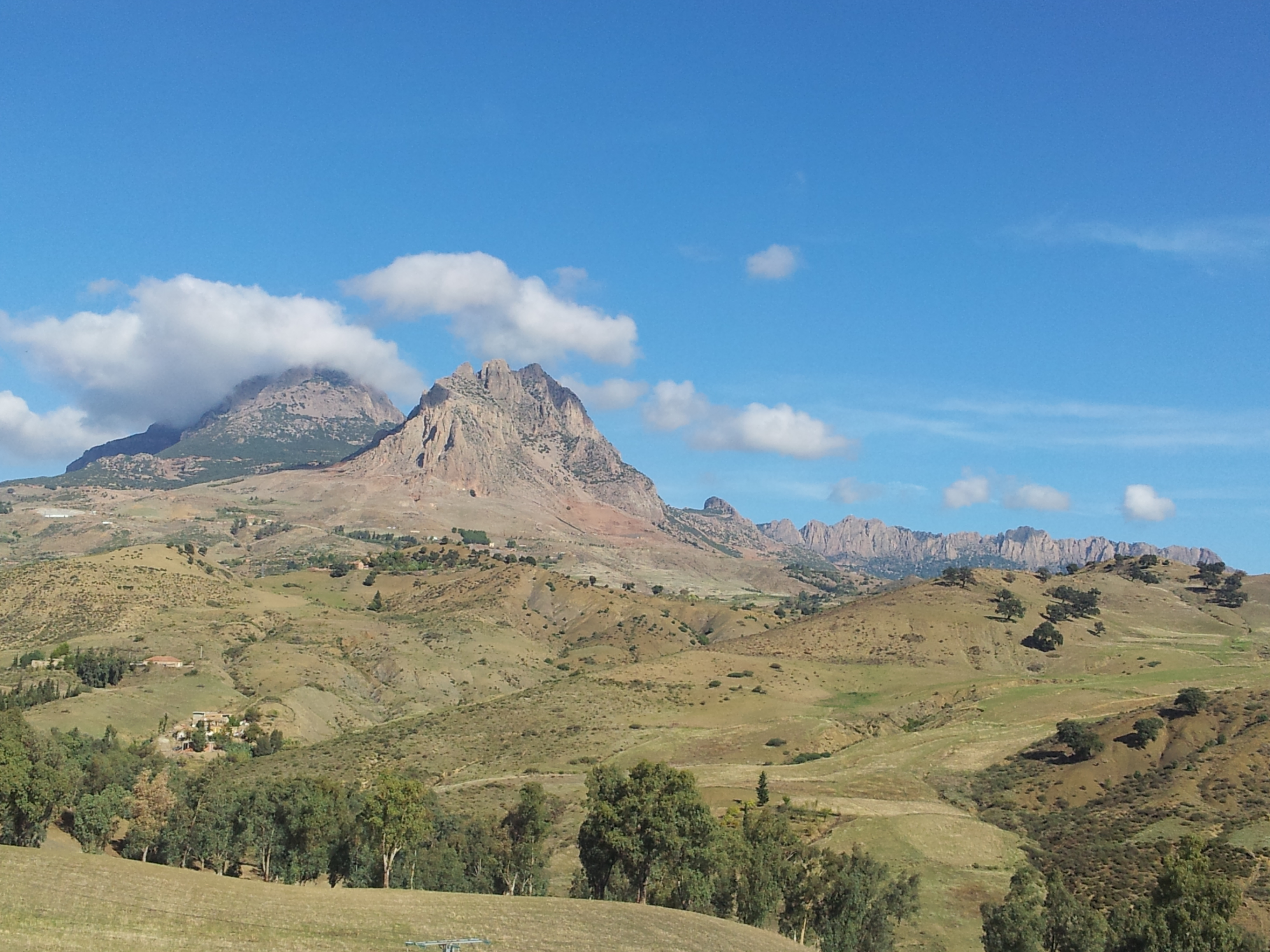 Massif de Ouarsenis (1 985m), près de la commune de Tamalaht dans la wilaya de Tissemsilt (Algérie)